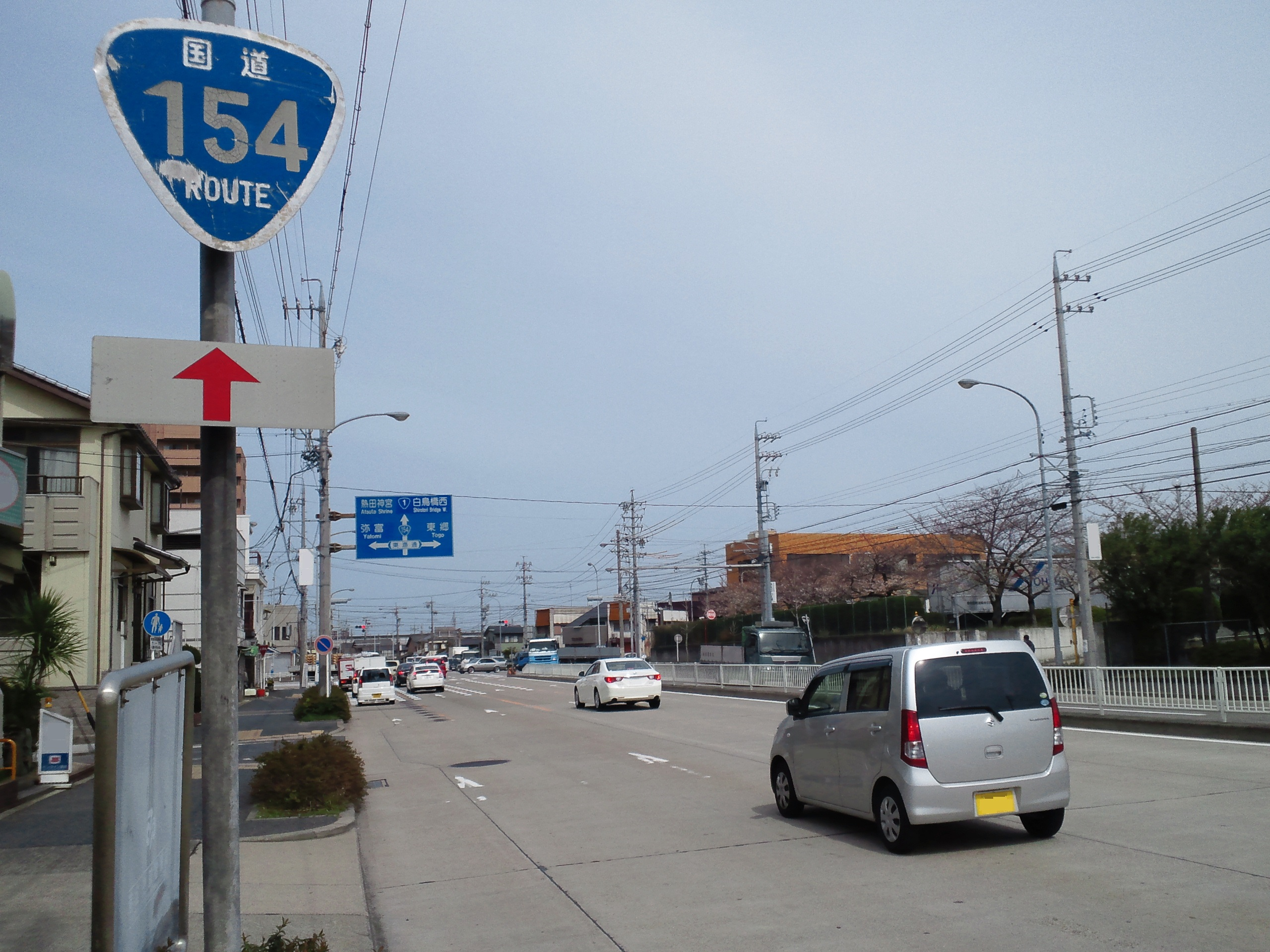 名古屋市港区の国道154号。